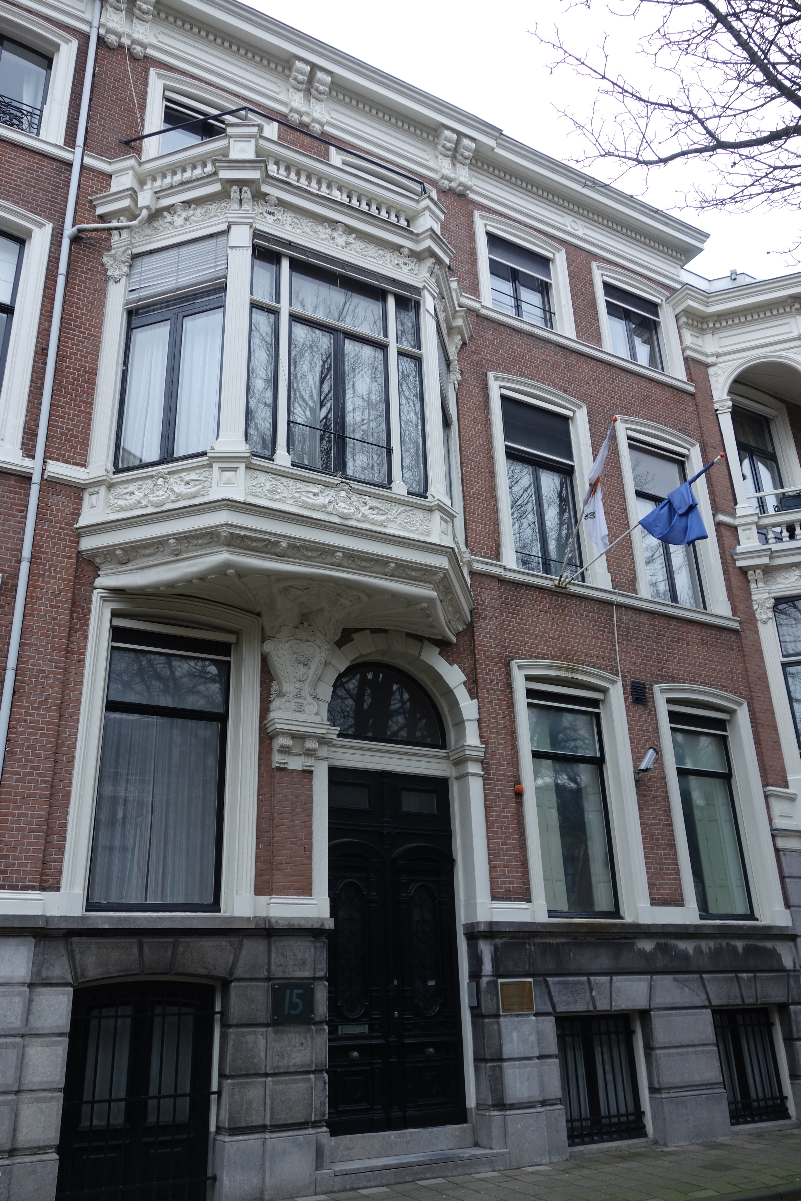 Woonhuis aan de Surinamestraat in Den Haag. Pand is, naar ontwerp van J. Th. Besseling, in eclectische stijl gebouwd. Het is gemeentelijk monument.